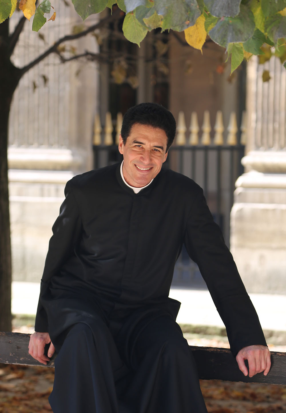 Le Père Michel-Marie Zanotti-Sorkine à Paris en 2016.